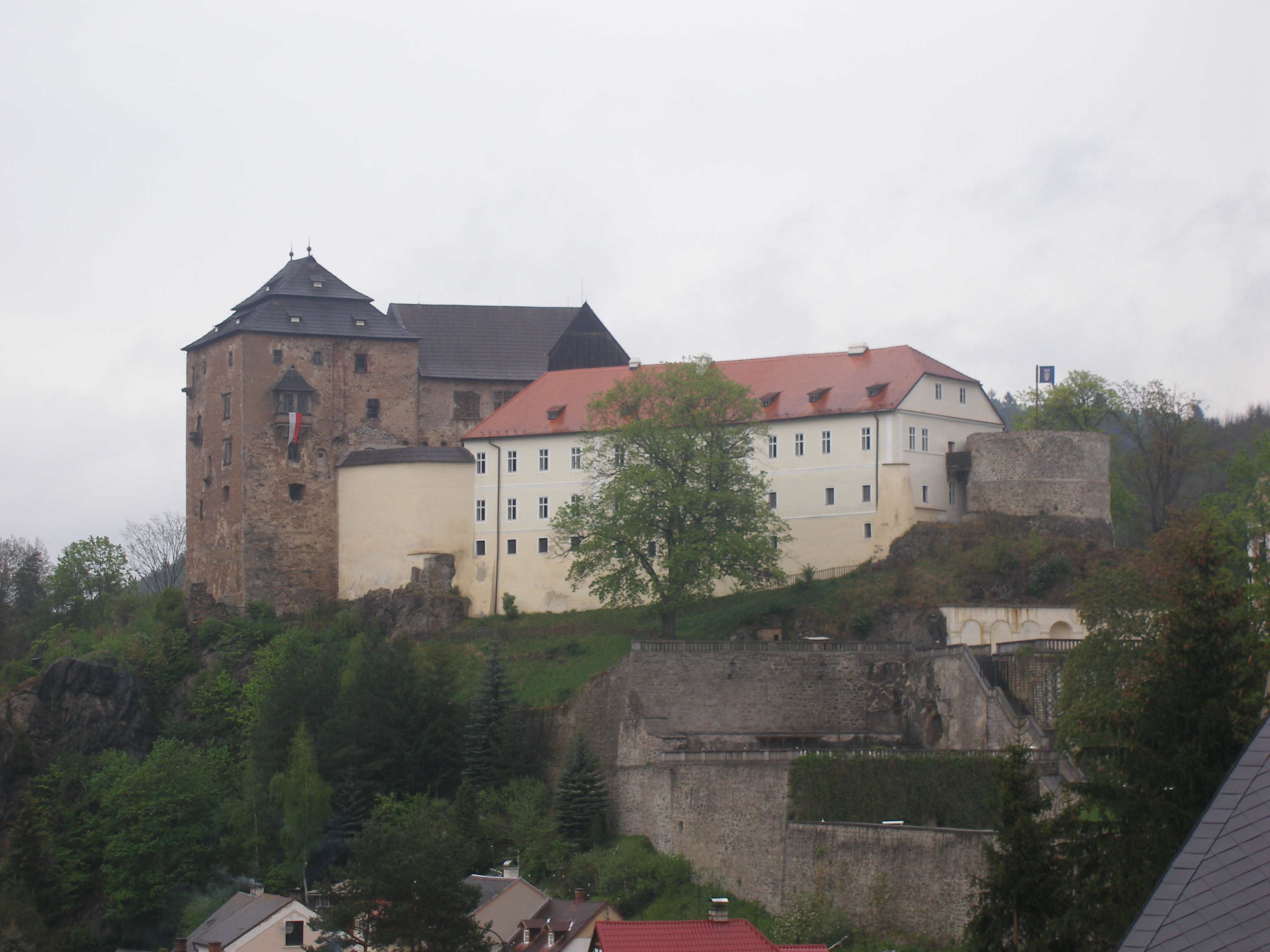 Pohled na Hrad Bečov nad Teplou